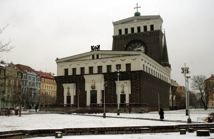 Heliga hjärtats kyrka i Prag. Arkitekt: Plecnik